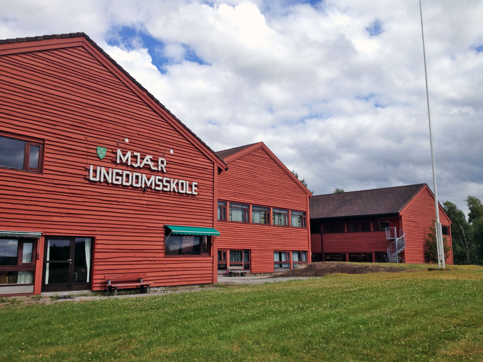 Mjær ungdomsskole,Ytre Enebakk, sør for Oslo